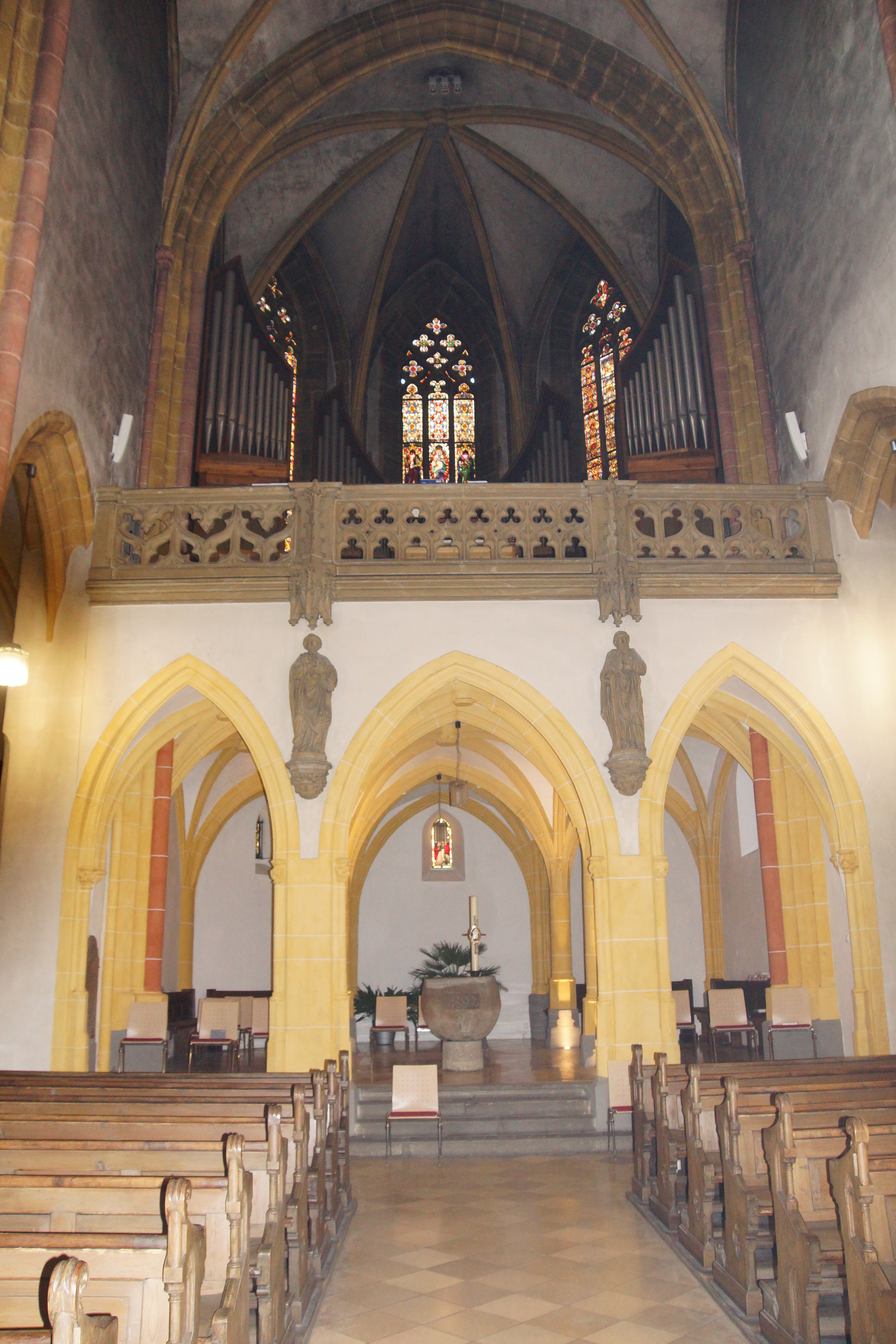 Die Pfarrkirche St. Johann Baptist in Nabburg